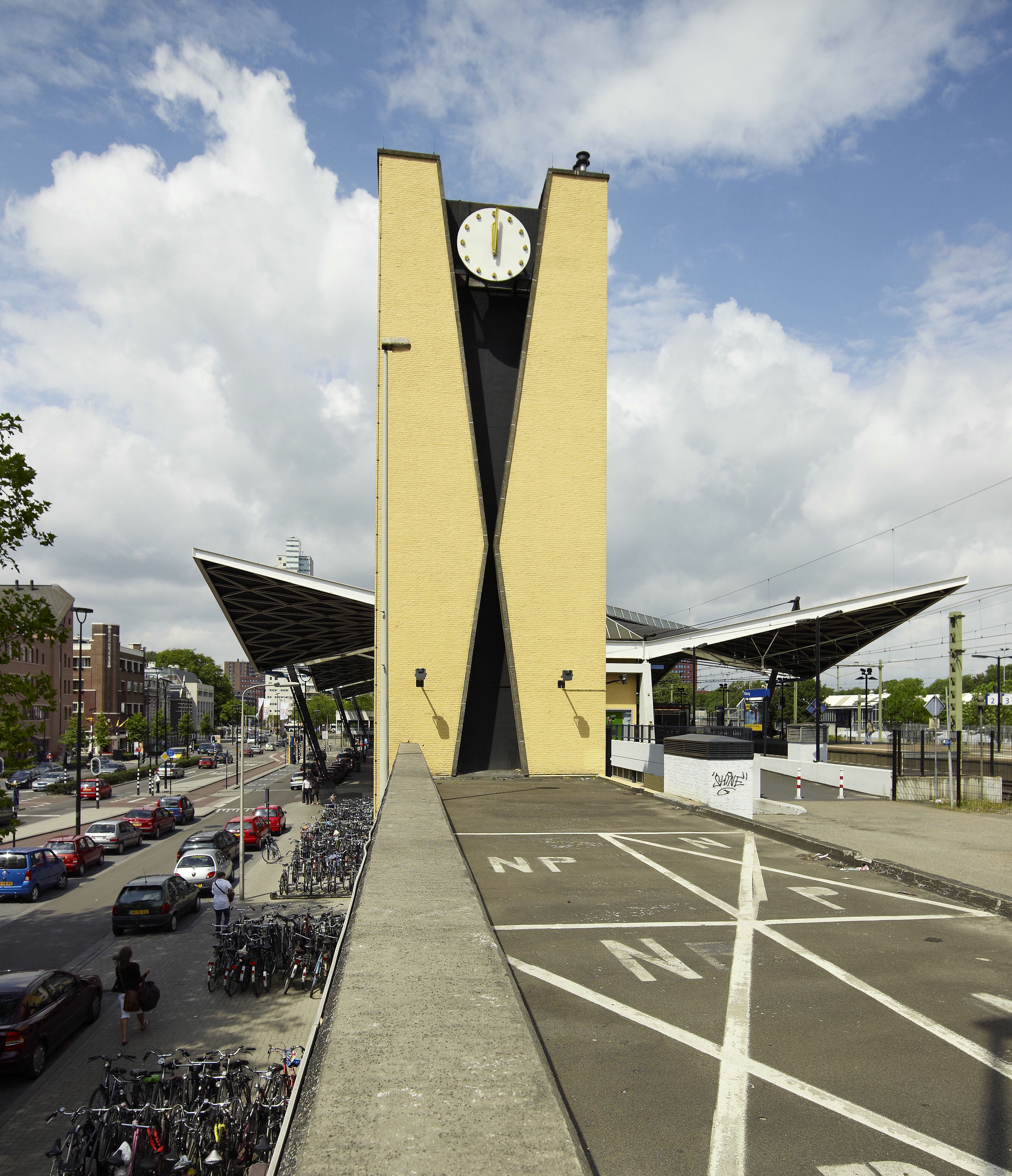 Station Tilburg: Overzicht